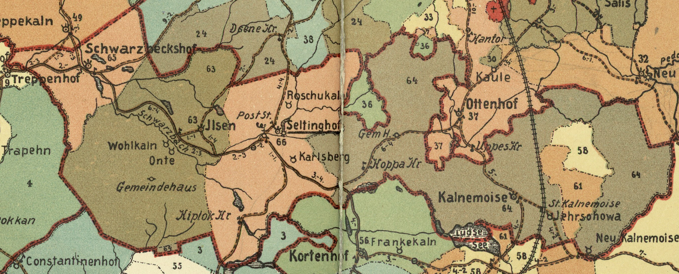 Zeltiņi kihelkonna mõisad 1904. aasta kaardil.